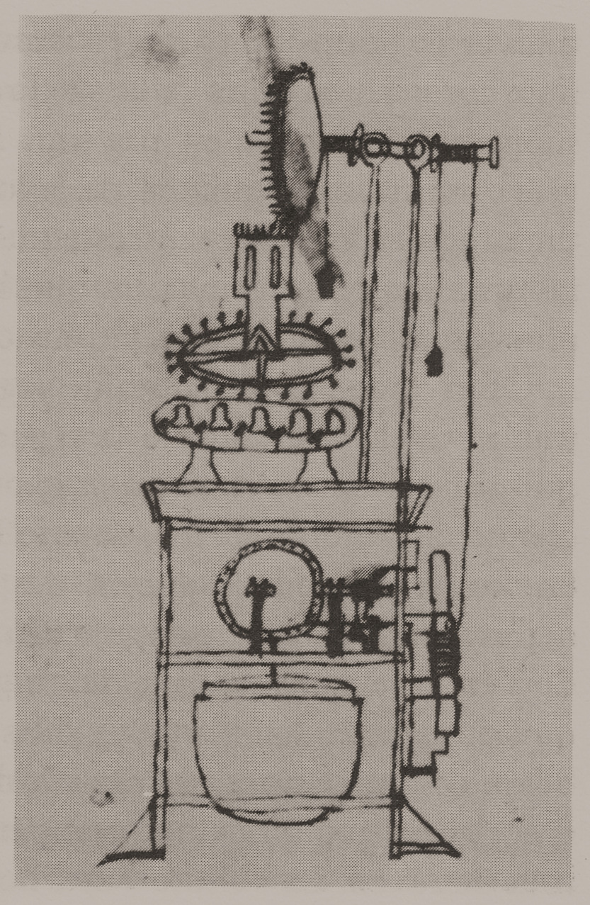 Croquis d'un mécanisme de carillon avec entrainement à eau.